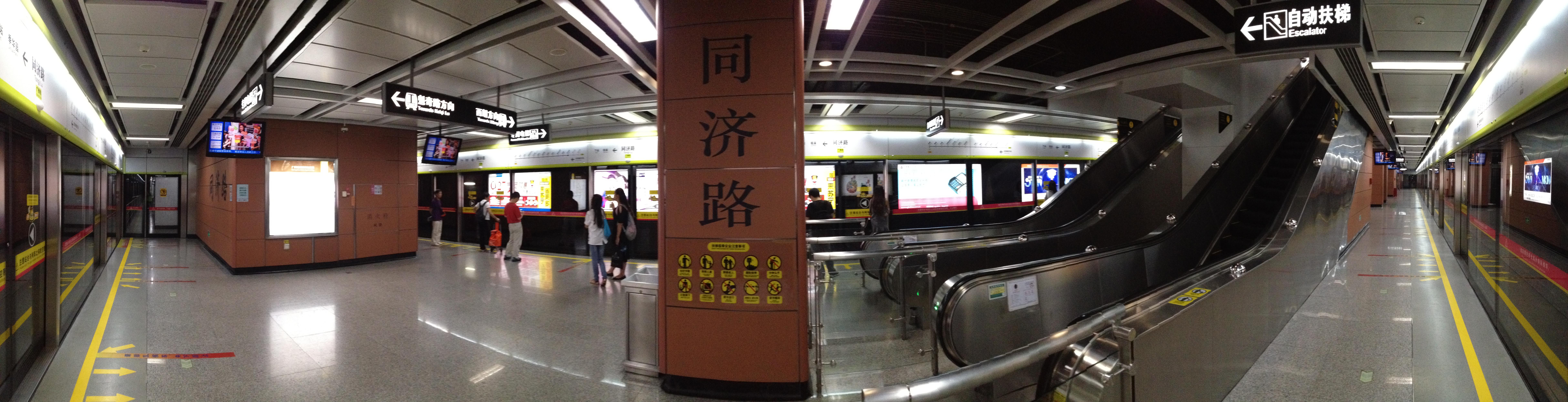 广佛地铁同济路站月台全景图